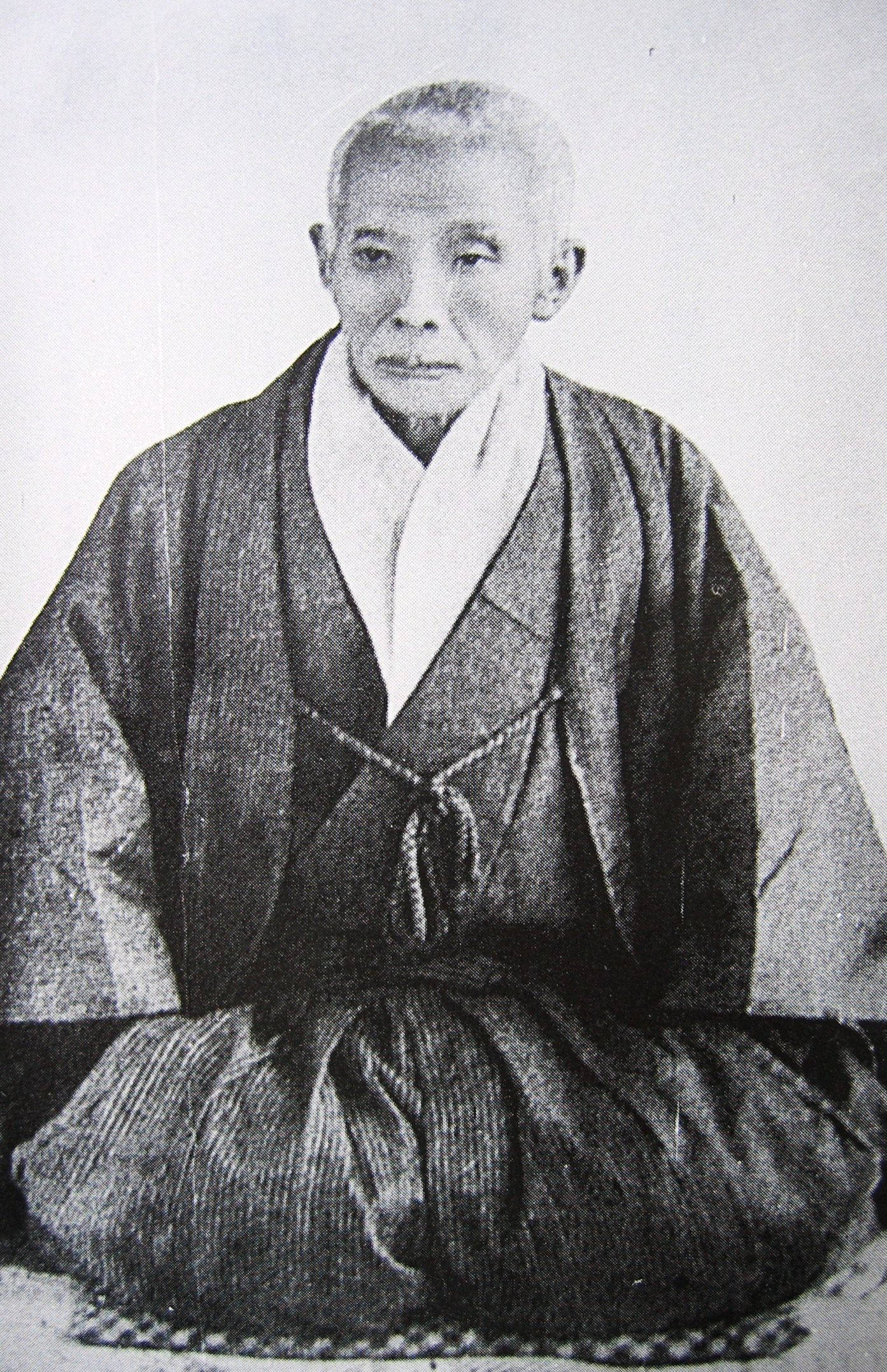 高橋正作の写真